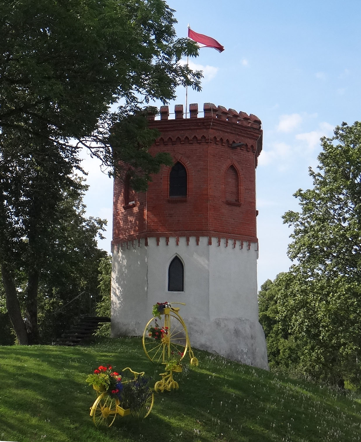 Одна из достопримечательностей г Приекуле, так называемая "Пороховая Башня"